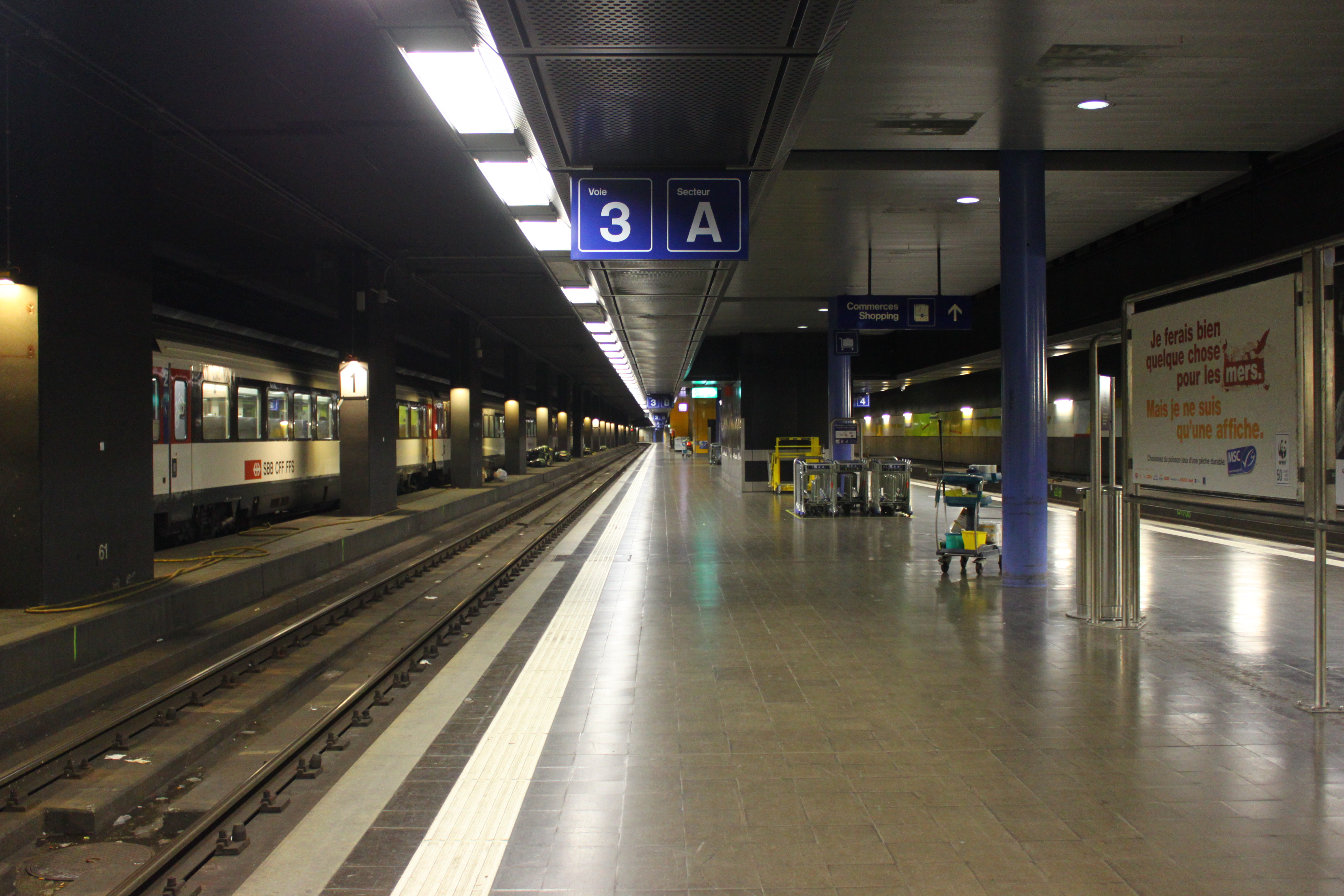 Les quais se trouvant au sous-sol de la gare de Genève-Aéroport